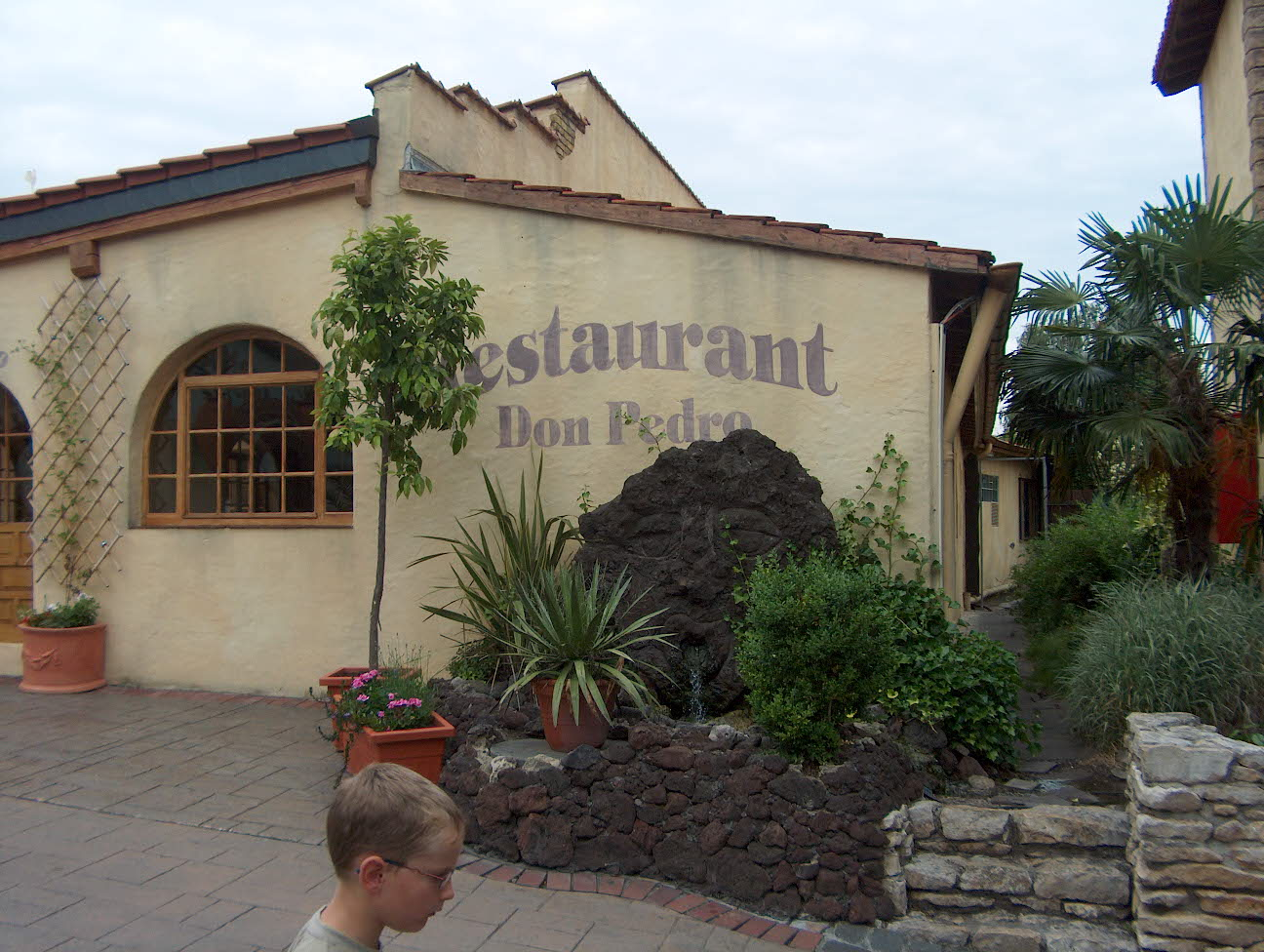 casa magnética